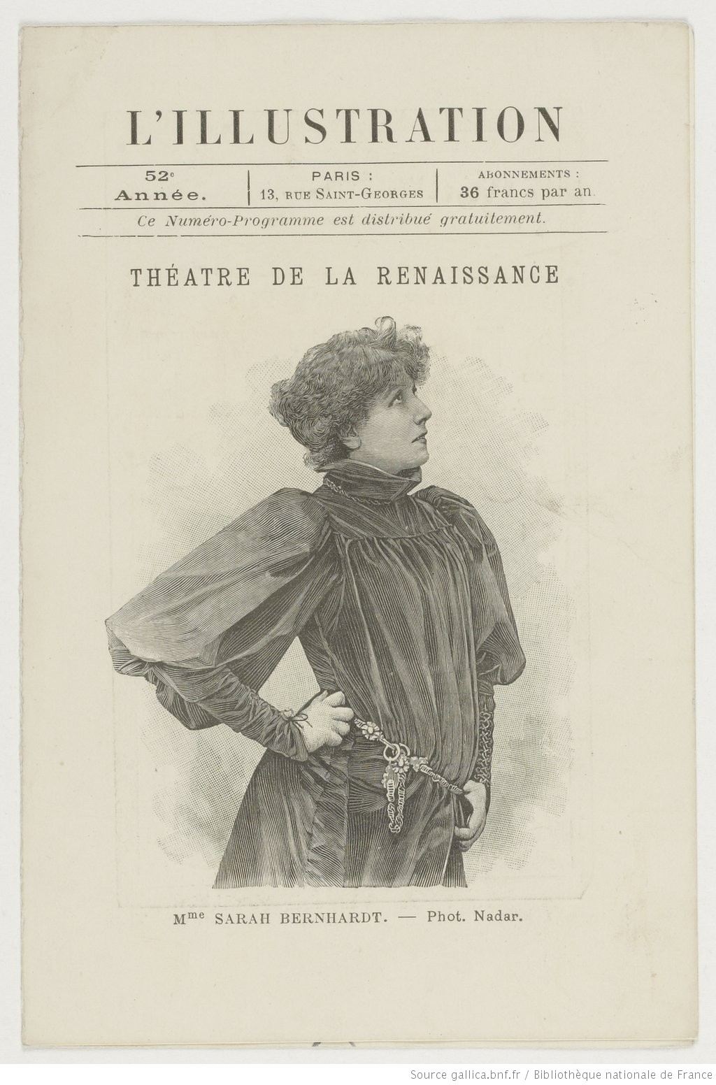 Sarah Bernhardt dans Fédora, drame de Victorien Sardou, théâtre de la Renaissance, 11 avril 1894 (photographie de Nadar pour L'Illustration)